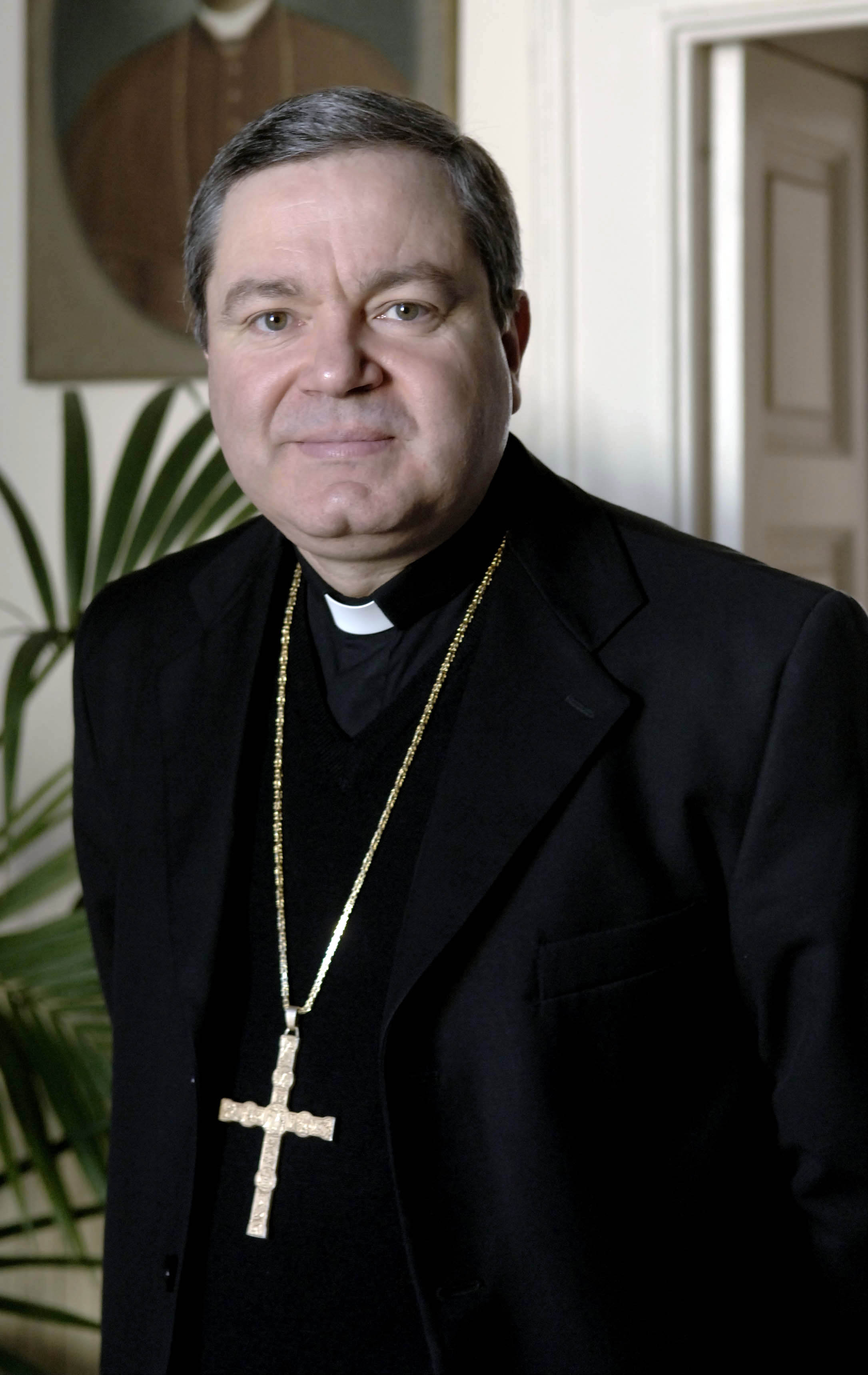 L'arcivescovo italiano Santo Marcianò.